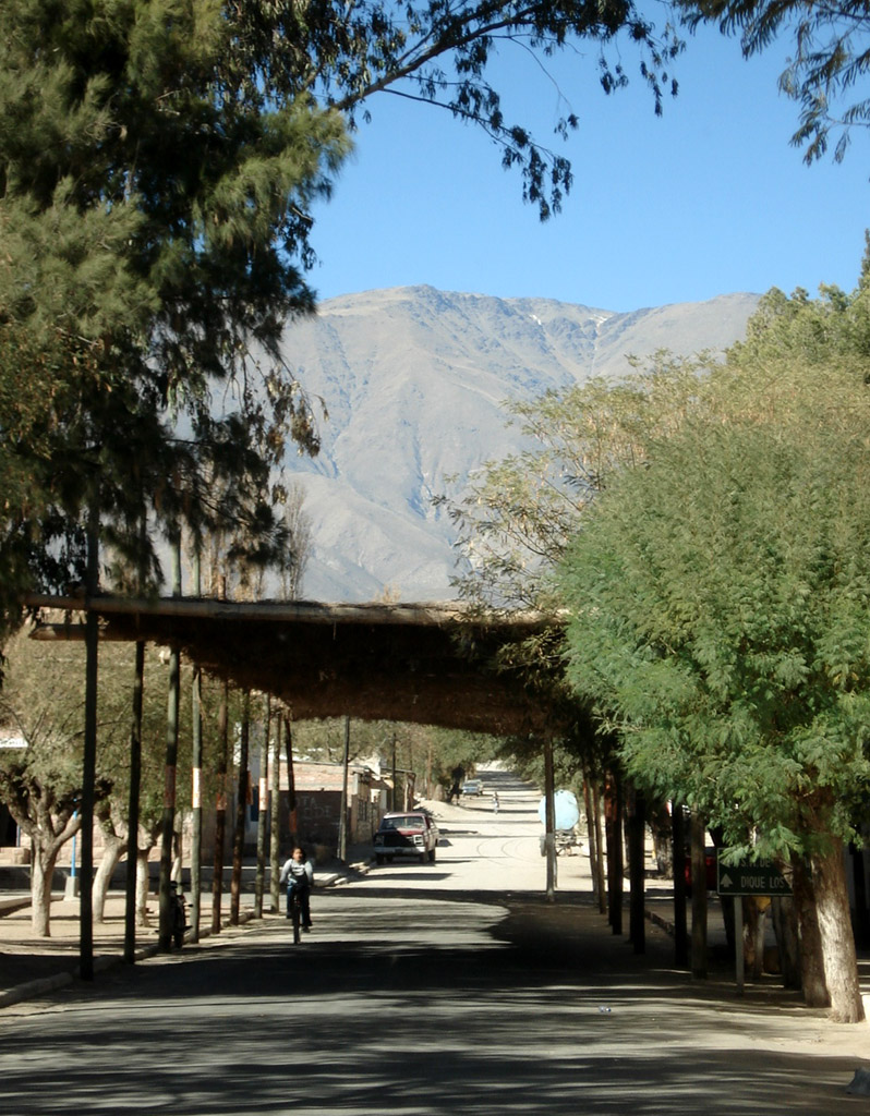 Calle de la villa/Street in Amaicha del Valle, Tucumán.